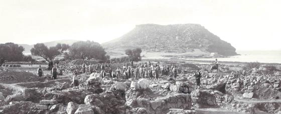 Minoische Ruinen in Roussolakkos. Ausgrabung der Britischen Schule der Archäologie im Jahr 1902.